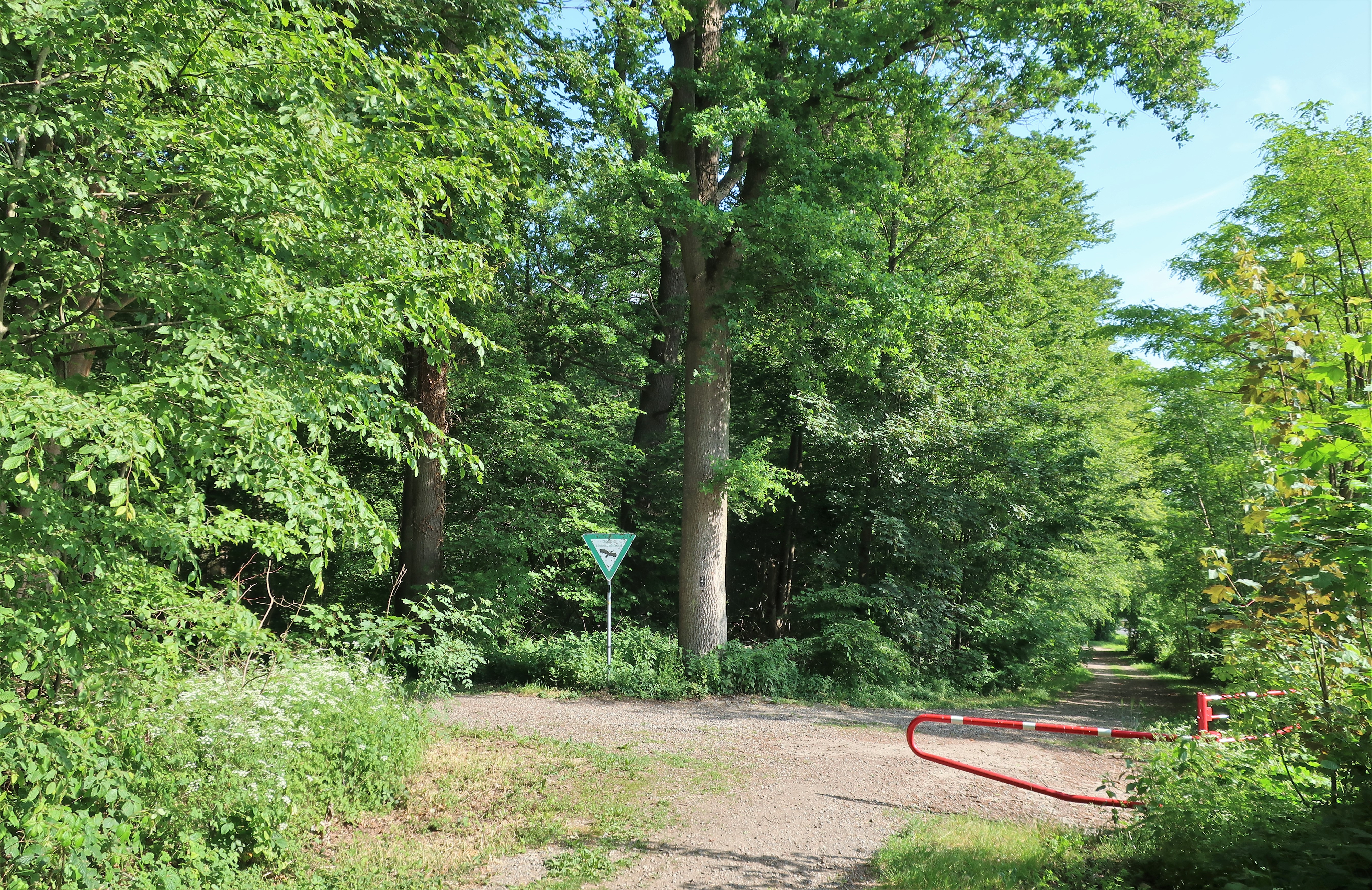 Geschützter Landschaftsbestandteil 1.4.2.12 „Feuchtgebiet Weidekamp“ in Hagen, nordwestlich der Weidekampstraße. Es handelt sich um einen Laubmischwald mit Quellbereichen und Kleingewässern.